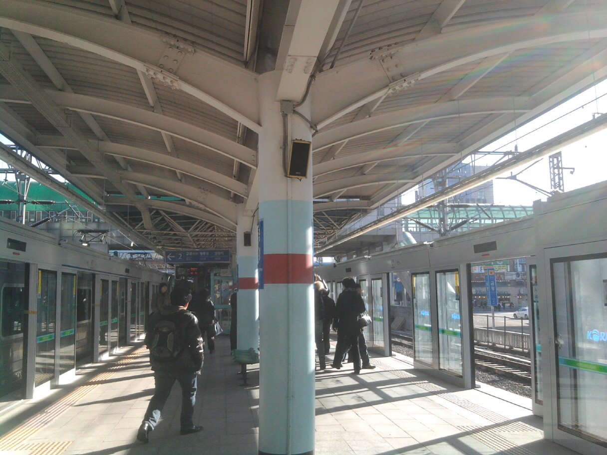 1.4호선 금정역 스크린도어 설치 이후